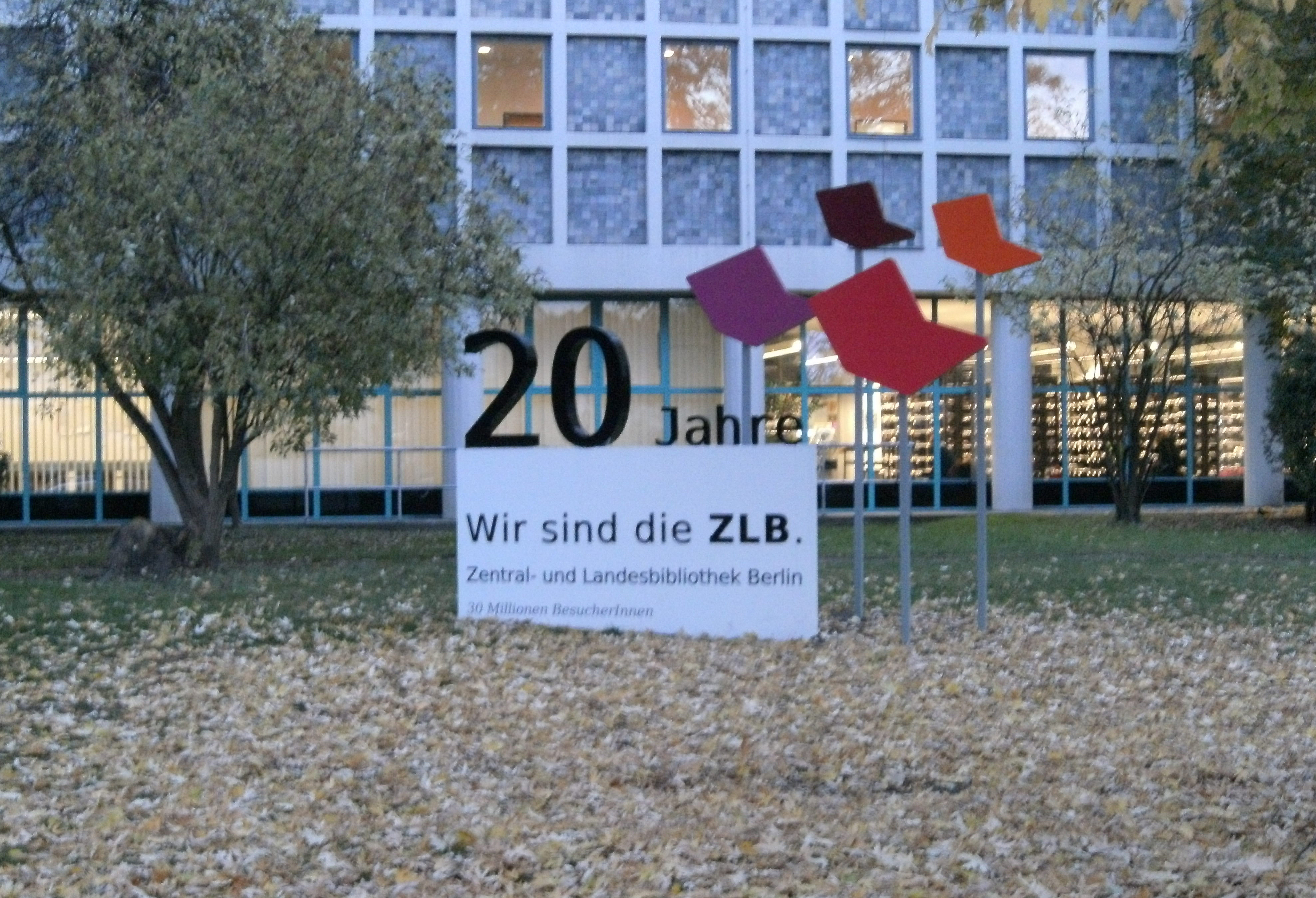 Skulptur neben dem Haupteingang der Amerika Gedenkbibliothek zum 20. Jahrestag der ZLB